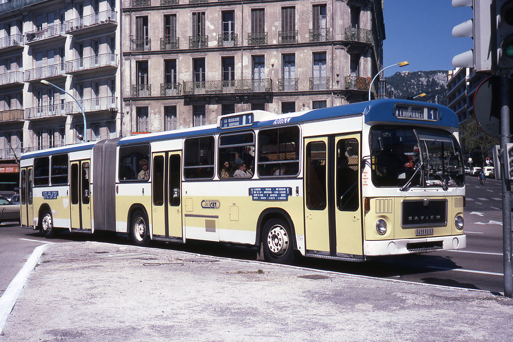 Un Saviem SG220 (chassi MAN) à Toulon en 1980